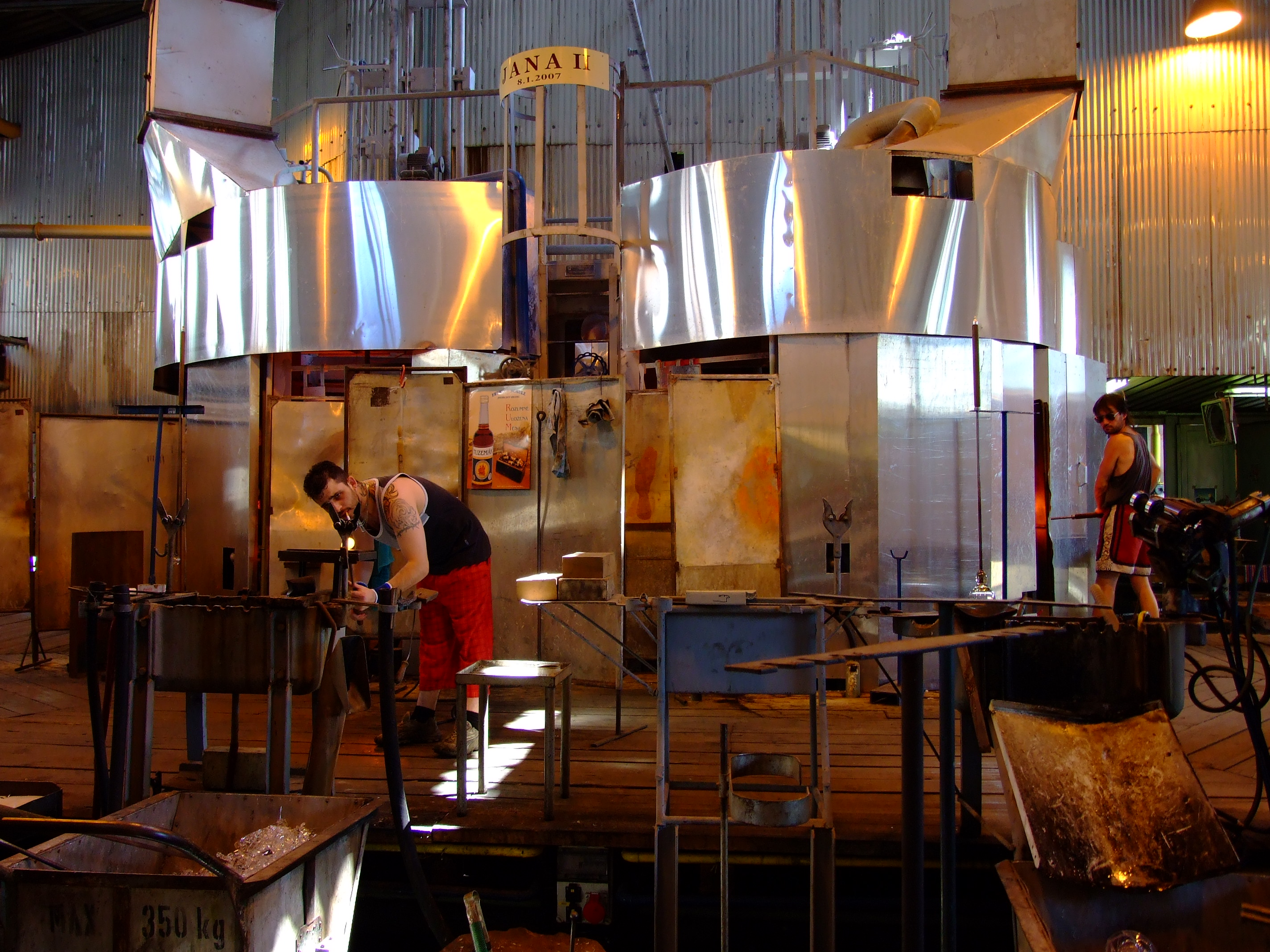 Pece ve sklárně v Nižborunápověda